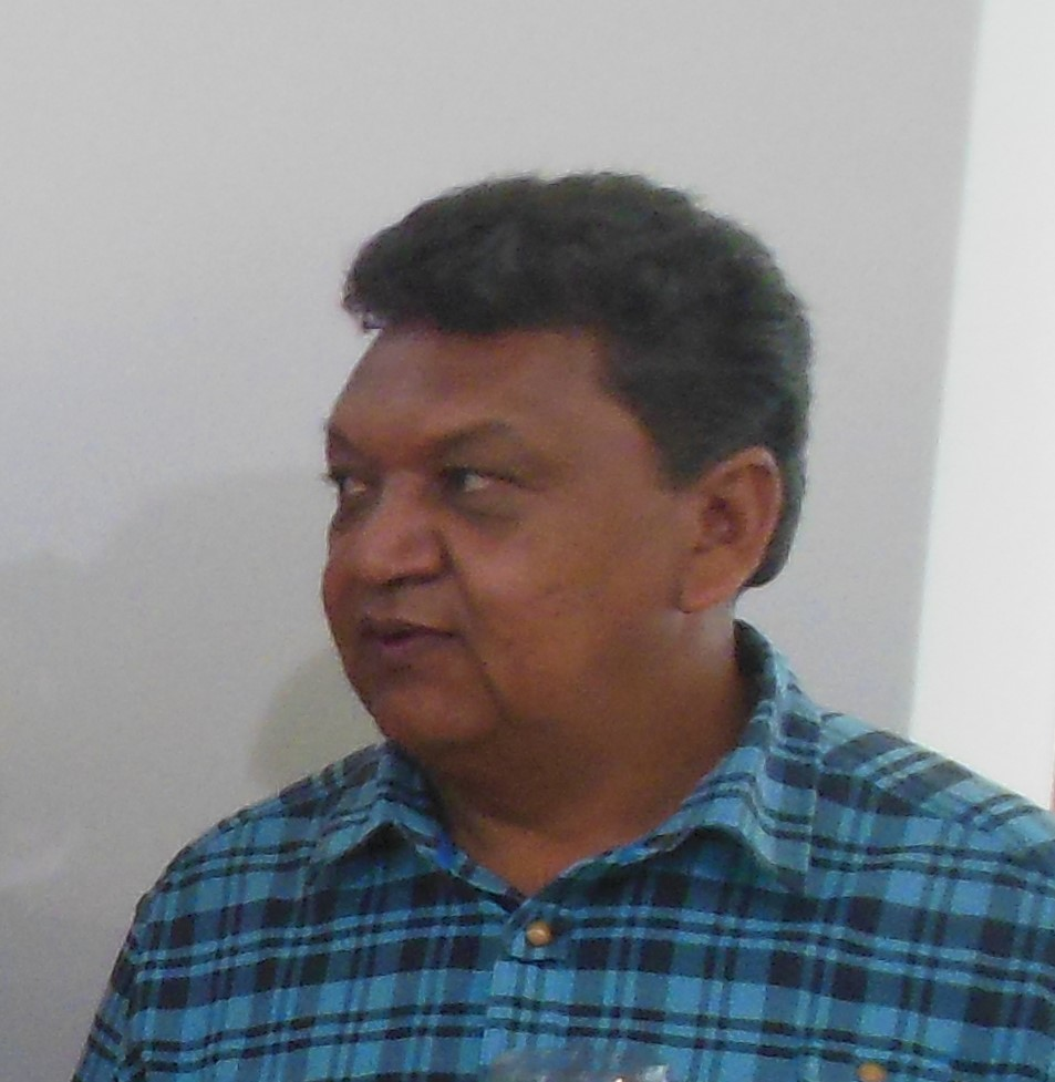 Retrato del artista